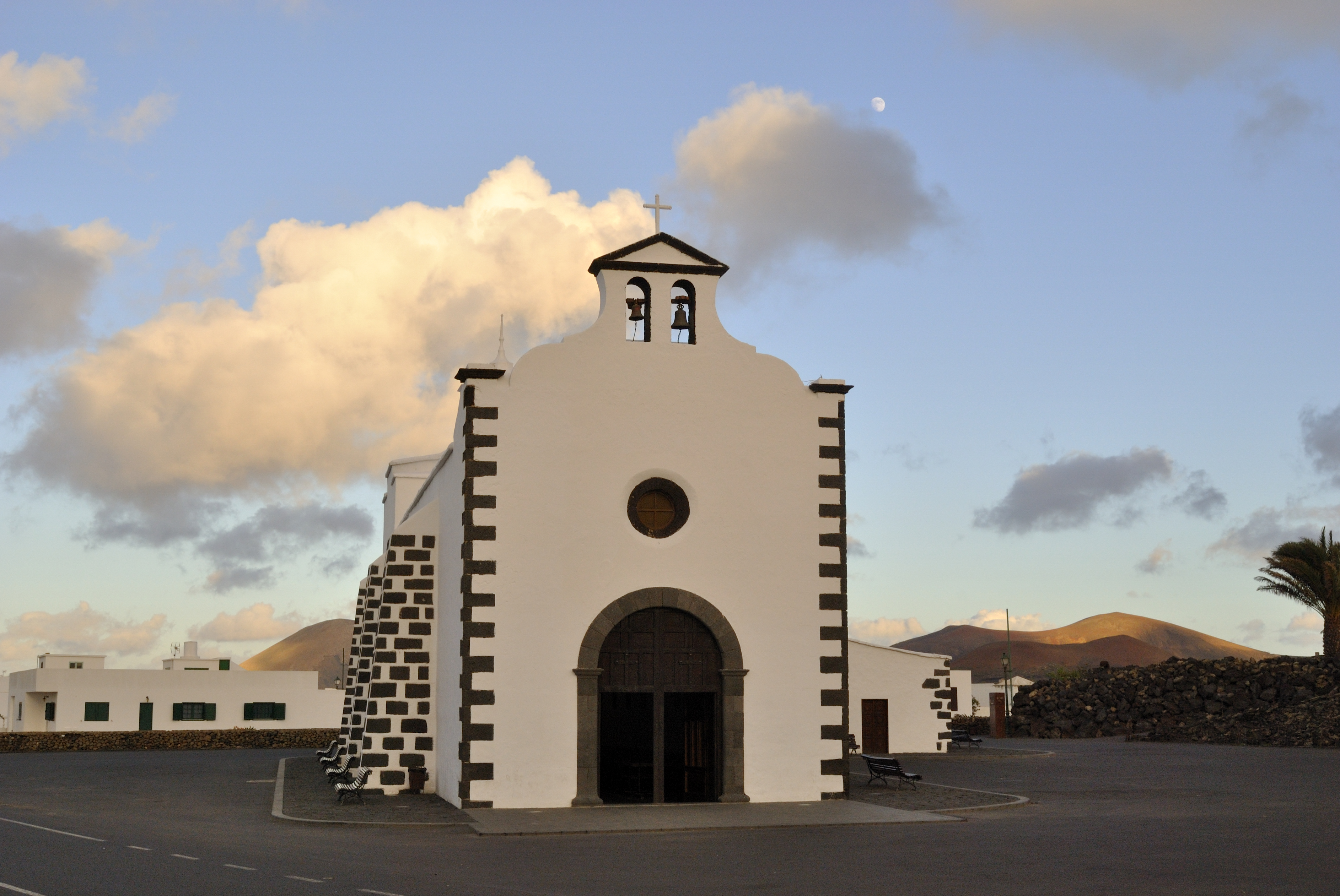 Frontal de la Ermita de los Dolores.